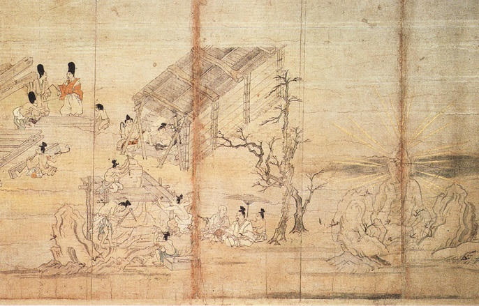 Scultpure d'une statue du bouddha Miroku sur le site sacré prêt du Taima-dera dans les temps anciens.